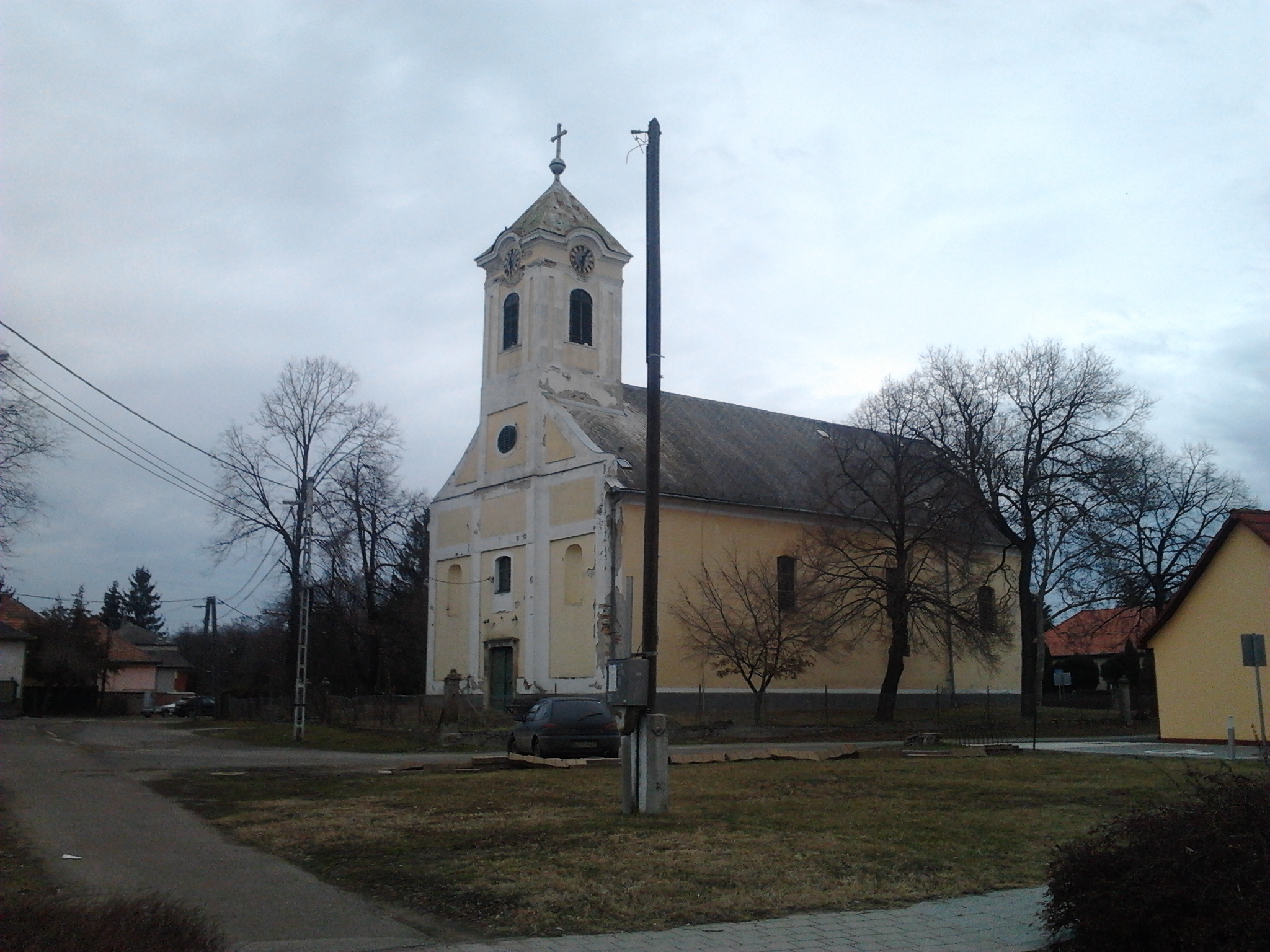 Lőrinci római katolikus temploma.